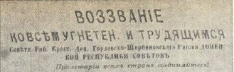 Оглавление відозви. Горлівсько-Щербинівського Ради робітничо селянських депутатів 1918